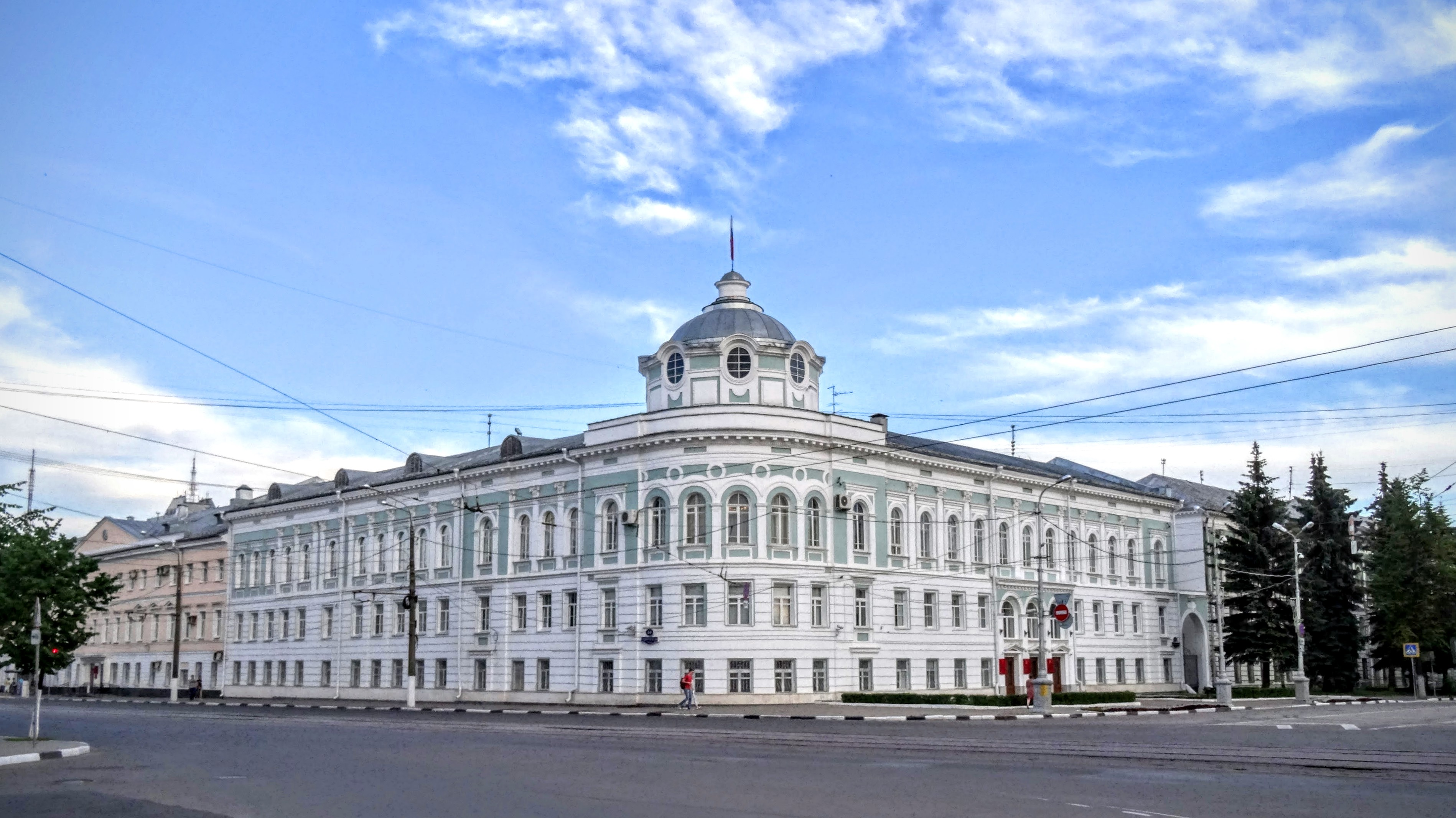 Здание администрации Тверской области с фрагментами жилых домов: улица Володарского, 44/44, Тверь, Тверская область